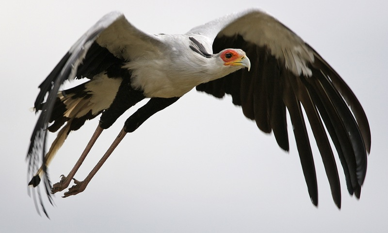 Secretarybird Sagittarius serpentarius Masai Mara, Kenya August 29, 2008 690V2112